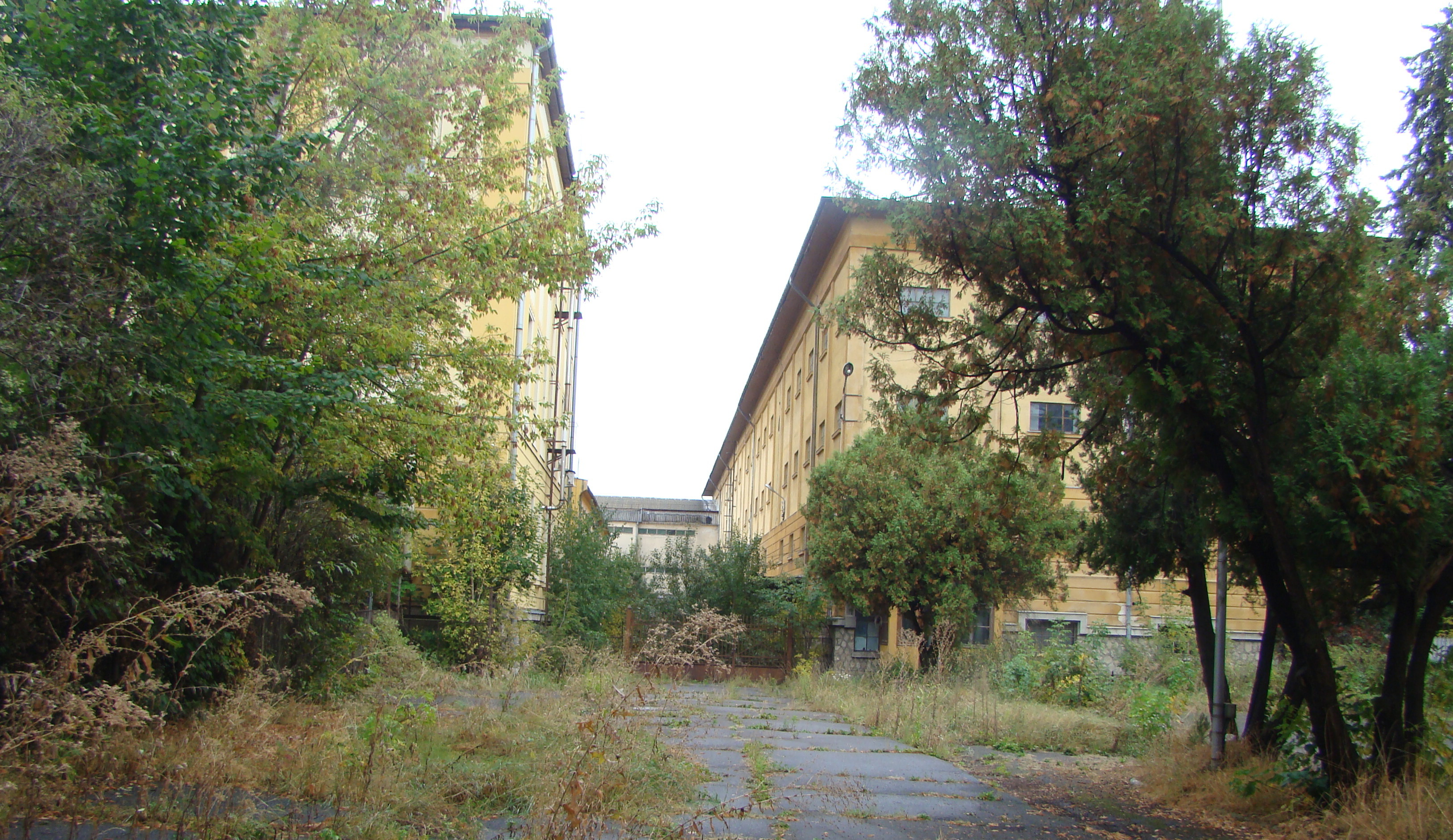 Ansamblul „Fabrica de Tutun”, municipiul Sfântu Gheorghe, str. Kós Károly 21-25 1902 - 1910